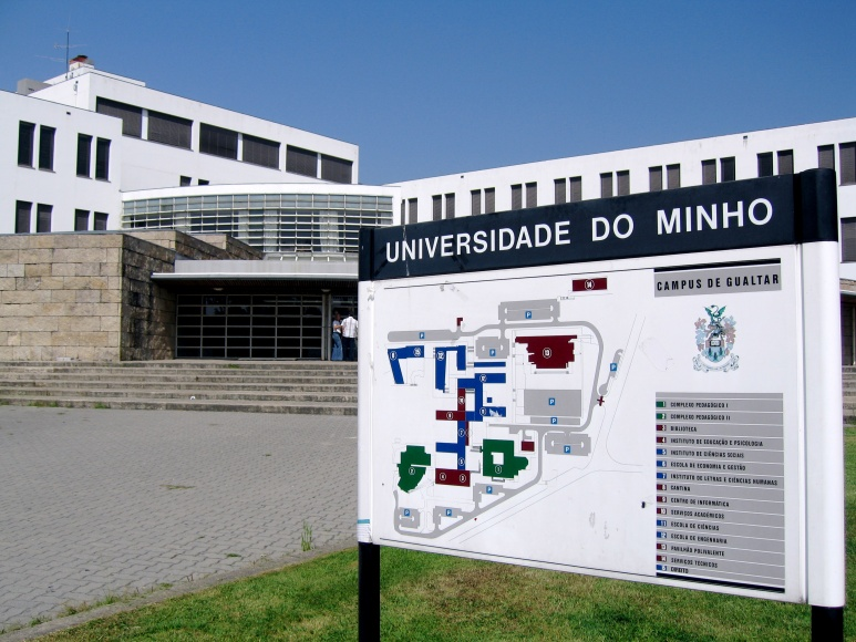 Entrada para Complexo Pedagógico II e mapa do Pólo de Gualtar da Universidade do Minho.